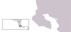 Autor: Sergio Arroyo. Donado al dominio público para cualquier tipo de uso.